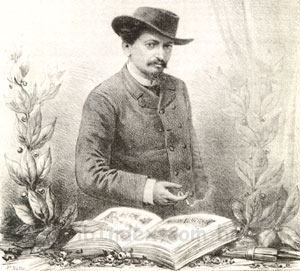 Auto-retrato do cartunista Angelo Agostini